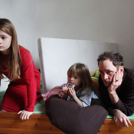 Vater mit Töchtern